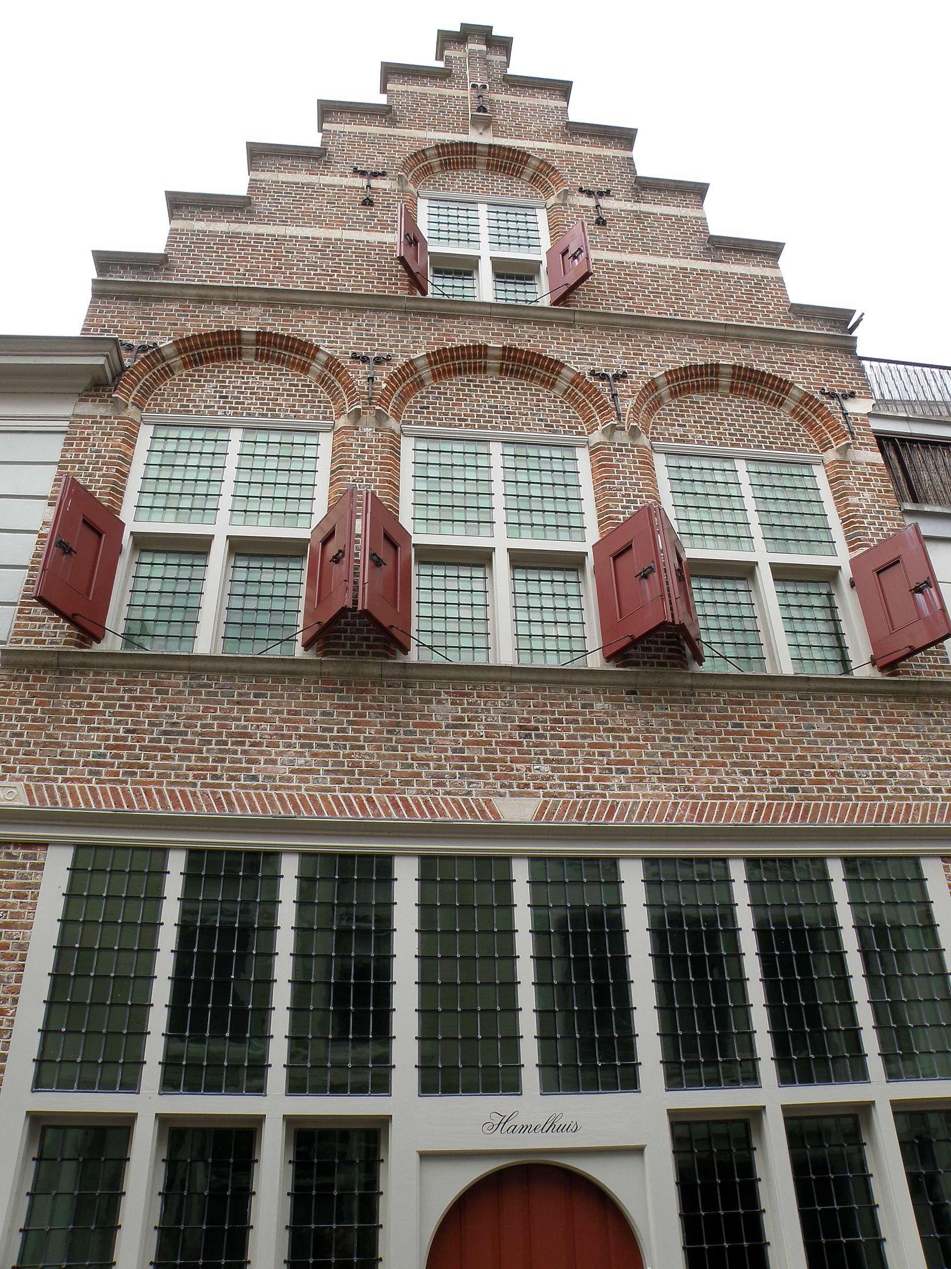 Gorinchem (prov. Zuid-Holland, Nederland). Hamelhuis, Kortendijk nr.55.